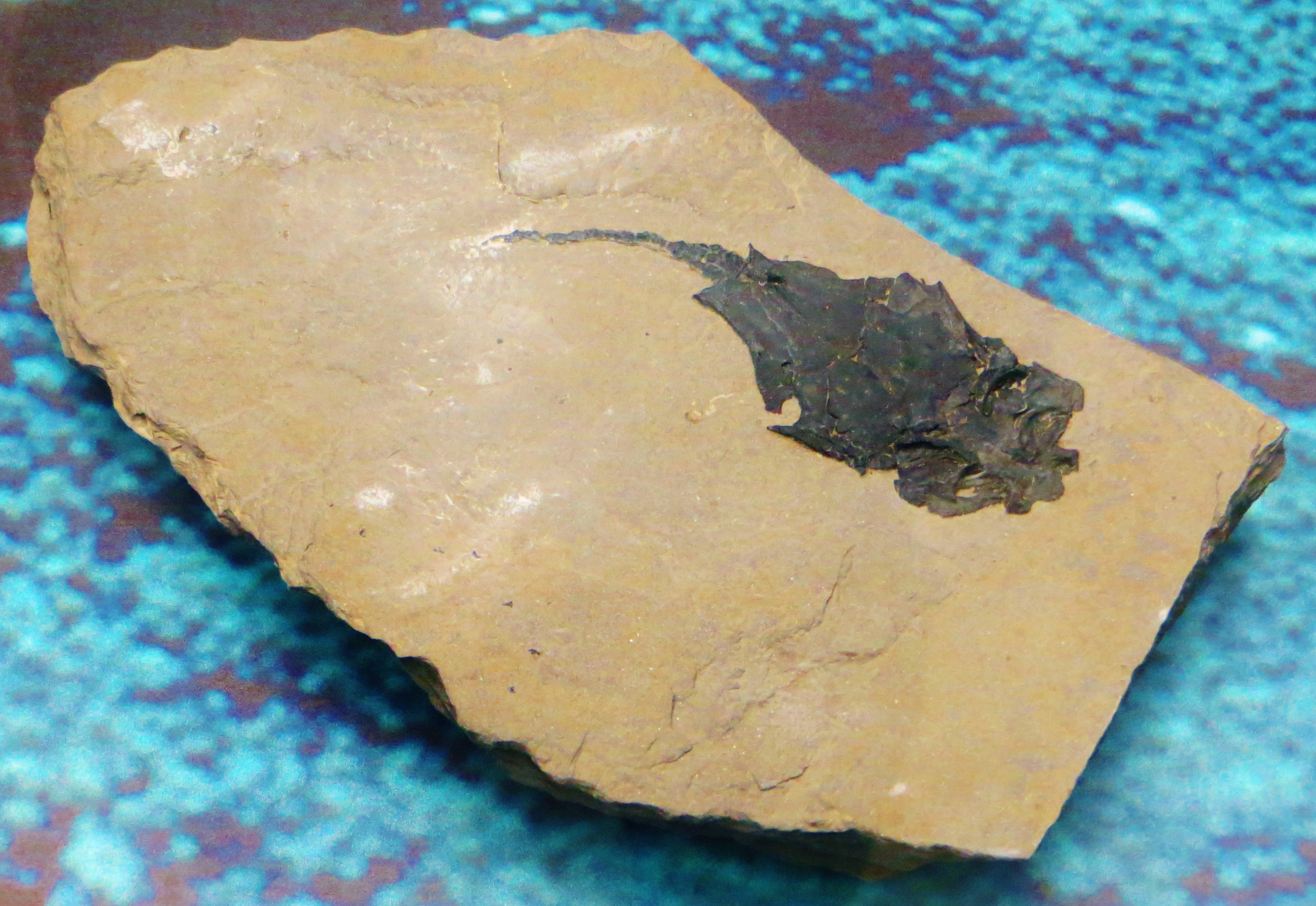 Fossil of Millerosteus, an extinct fish- Took the picture at Museo di Storia Naturale di Milano